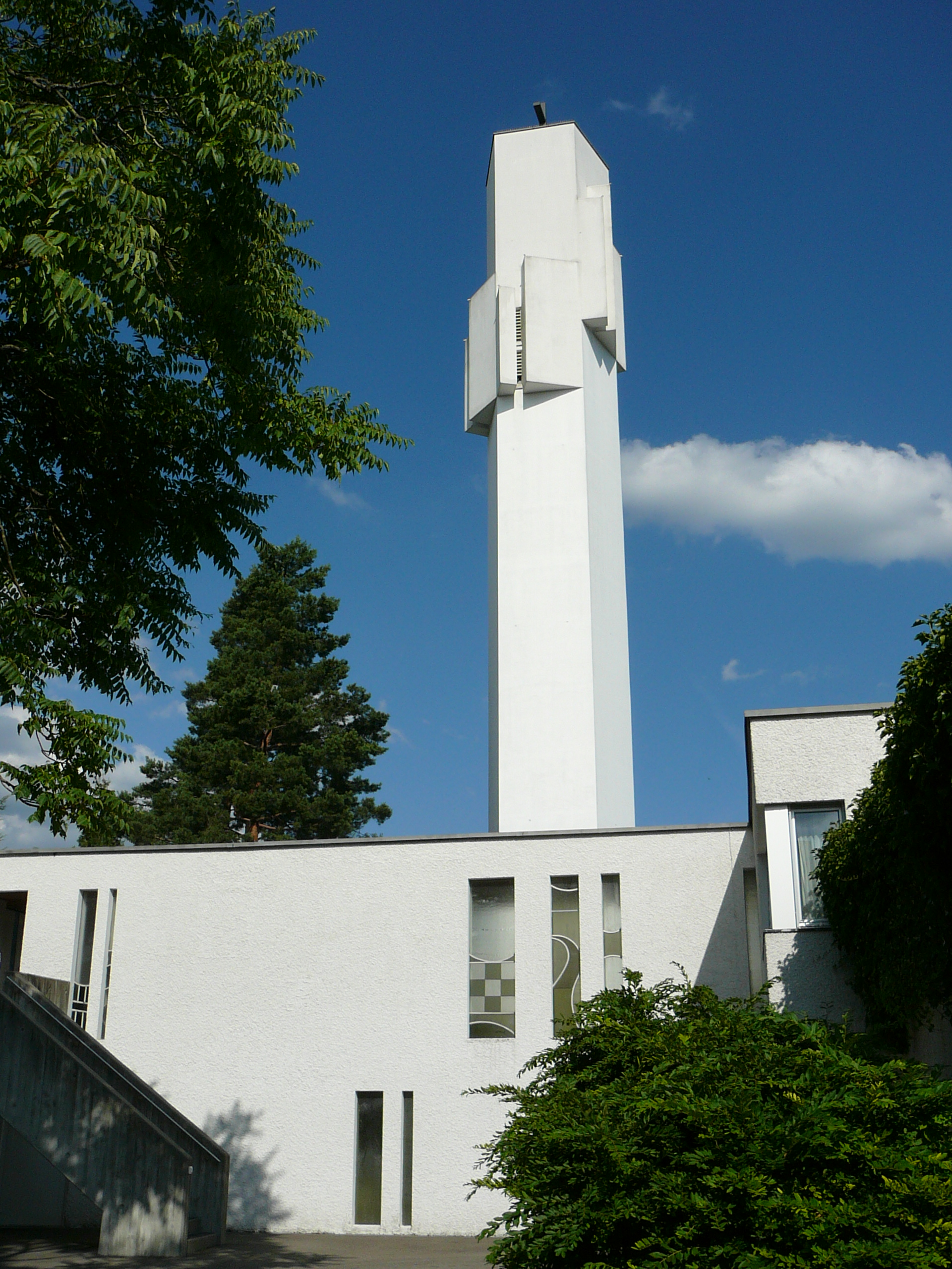 Römisch-katholische Pfarrkirche St. Michael Zollikerberg, Kirchturm von Westen